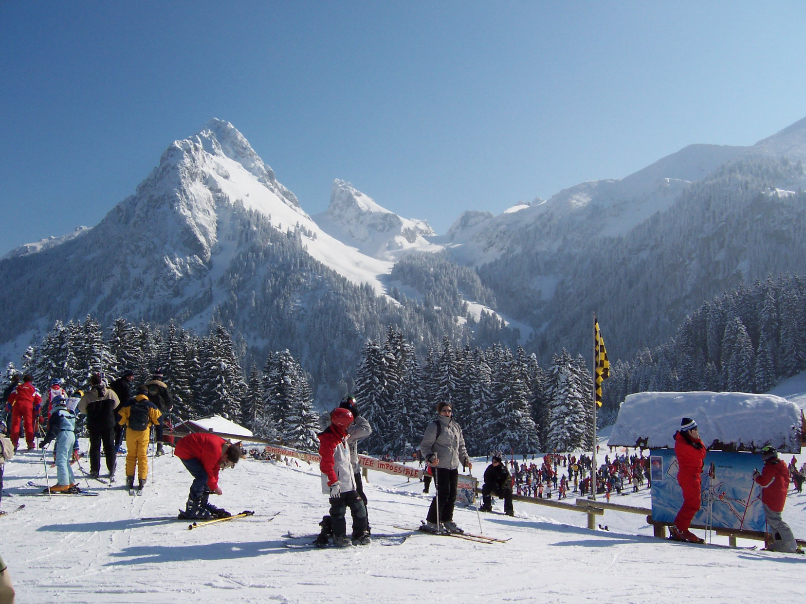 Vue de la dent d'oche, emblème de la station de ski et du village de Bernex, située à 12 km d'Evian-les-Bains en Haute-Savoie